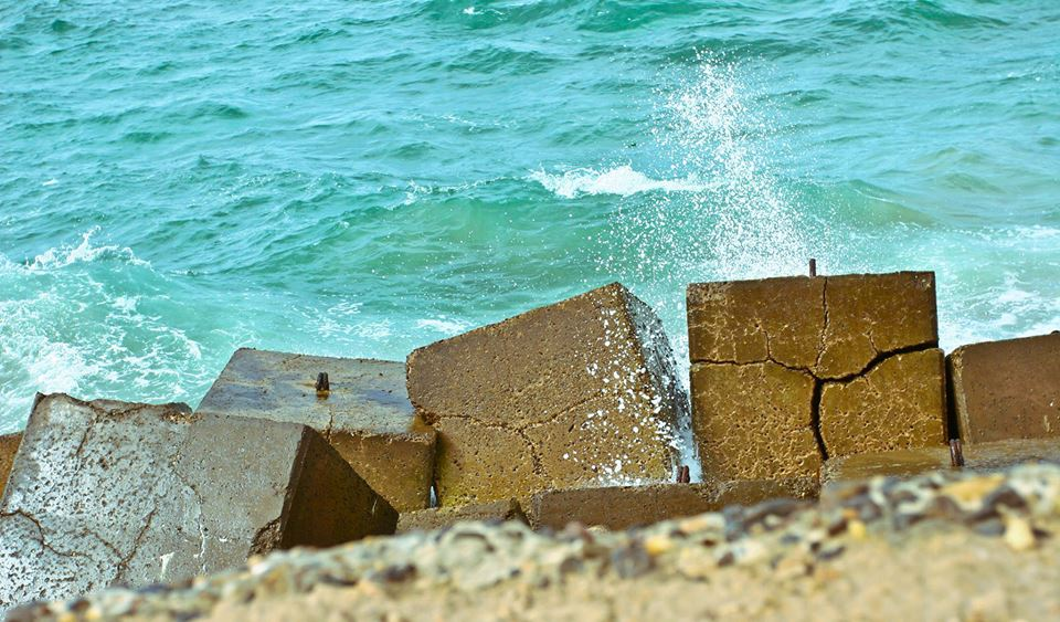 صخور شاطئ مدينة الأسكندرية علي البحر المتوسط محافظة الإسكندرية في مصر، هي إحدى محافظات مصر والعاصمة الثانية بعد القاهرة والعاصمة القديمة لمصر، الميناء الأول لجمهورية مصر العربية. وتقع في شمال البلاد علي ساحل البحر المتوسط، وعاصمتها مدينة الأسكندرية وهي المدينة الأكبر بها بالإضافة إلى مدينة العامرية ومدينة برج العرب الجديدة. كما تضم المحافظة مركز ومدينة برج العرب. تبلغ مساحة المحافظة 2879 كيلومترا مربعا، وترتيبها السابع عشر من حيث المساحة بين محافظات جمهورية مصر العربية، وتحدها من الجنوب والشرق محافظة البحيرة ومن الغرب محافظة مطروح، يبلغ عدد سكان المحافظة نحو 4.1 مليون نسمة طبقاً للنتائج النهائية لتعداد مصر 2006 البحر الأبيض المتوسط أو البحر المتوسط - وسماه العرب قديمًا بحر الروم - هو بحر متصل بالمحيط الأطلسي وتحيط به منطقة البحر الأبيض المتوسط وهو شبه محاط تماماً بالبر: من الشمال الأناضول وأوروبا ومن الجنوب شمال أفريقيا ومن الشرق بلاد الشام. البحر من الناحية الفنية جزء من المحيط الأطلسي على الرغم من أنه يوصف عادة باعتباره كياناً مستقلاً تماماً. يغطي البحر الأبيض المتوسط مساحة تقارب 2.5 مليون كيلومتر مربع (965,000 ميل مربع)، ولكن نقطة ارتباطه بالأطلسي (مضيق جبل طارق) هي فقط بعرض 14 كم (8.7 ميل). في علم المحيطات، يطلق عليه أحيانا البحر المتوسط الأوروأفريقي أو البحر المتوسط الأوروبي لتمييزه عن البحار المتوسطة في أماكن أخرى من العالم.[1][2] يبلغ وسطي عمق البحر المتوسط 1,500 متر (4,900 قدم) حيث أعمق نقطة مسجلة هي 5,267 متر (17,280 قدم) في أعماق كاليبسو في البحر الايوني. كان البحر المتوسط عبر التاريخ طريقاً هاماً للتجار والمسافرين من العصور القديمة مما سمح بالتجارة والتبادل الثقافي بين الشعوب الناشئة في المنطقة أي في بلاد ما بين النهرين ومصر والفينيقيين وقرطاجنة والأيبيريين والإغريق والإيليريين وتراقيا والليفانتين ومن بلاد الغال والرومان والعرب والأمازيغ واليهود والسلافيين والثقافات التركية. تاريخ منطقة البحر الأبيض المتوسط أمر بالغ الأهمية لفهم نشأة وتطور العديد من المجتمعات الحديثة. "بالنسبة لثلاثة أرباع الكرة الأرضية، يمثل البحر المتوسط العنصر الموحد لمركز تاريخ العالم."